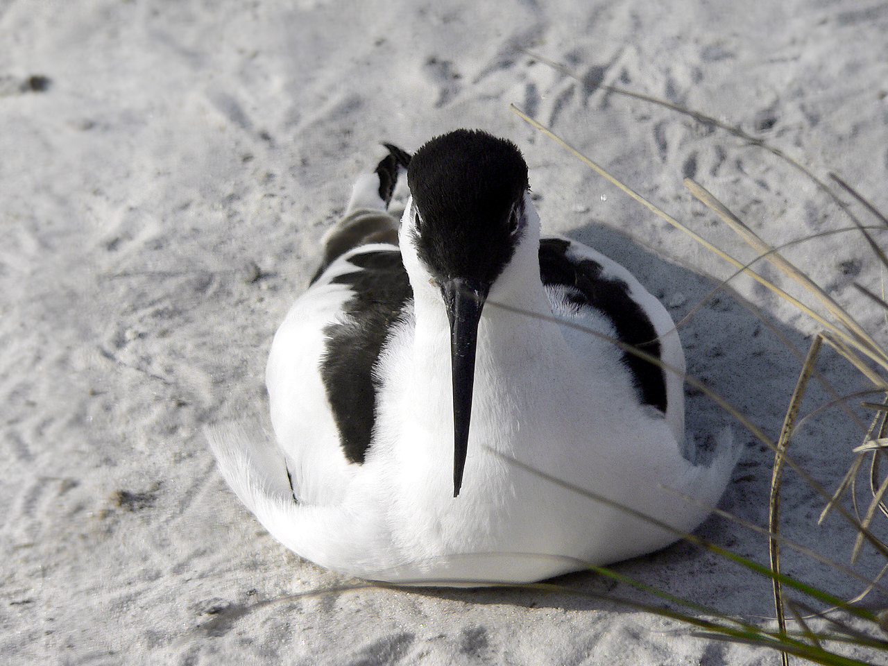 Recurvirostra avosetta, captive.